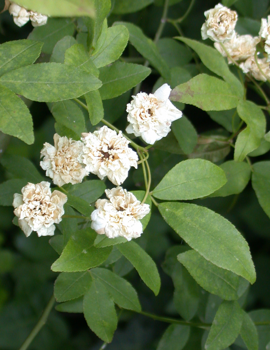 Roma, Roseto comunale, R. banksiae 'Banksiae' W.Kerr 1807 (Cina centrale) Babcksianae (6-05-2006)